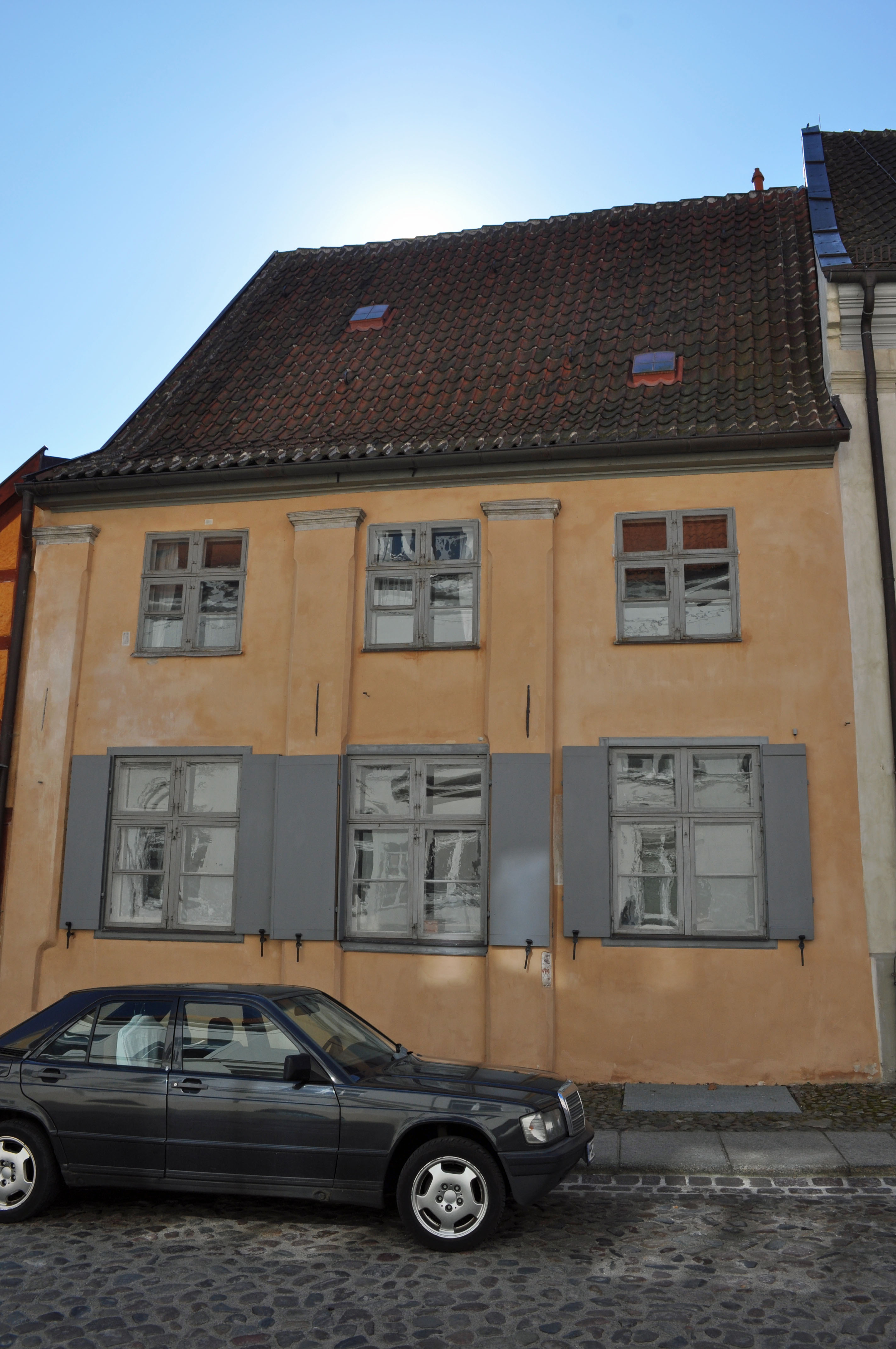 Gebäude bzw. Gebäudedetail in Stralsund. Straße und Hausnummer siehe Dateiname.